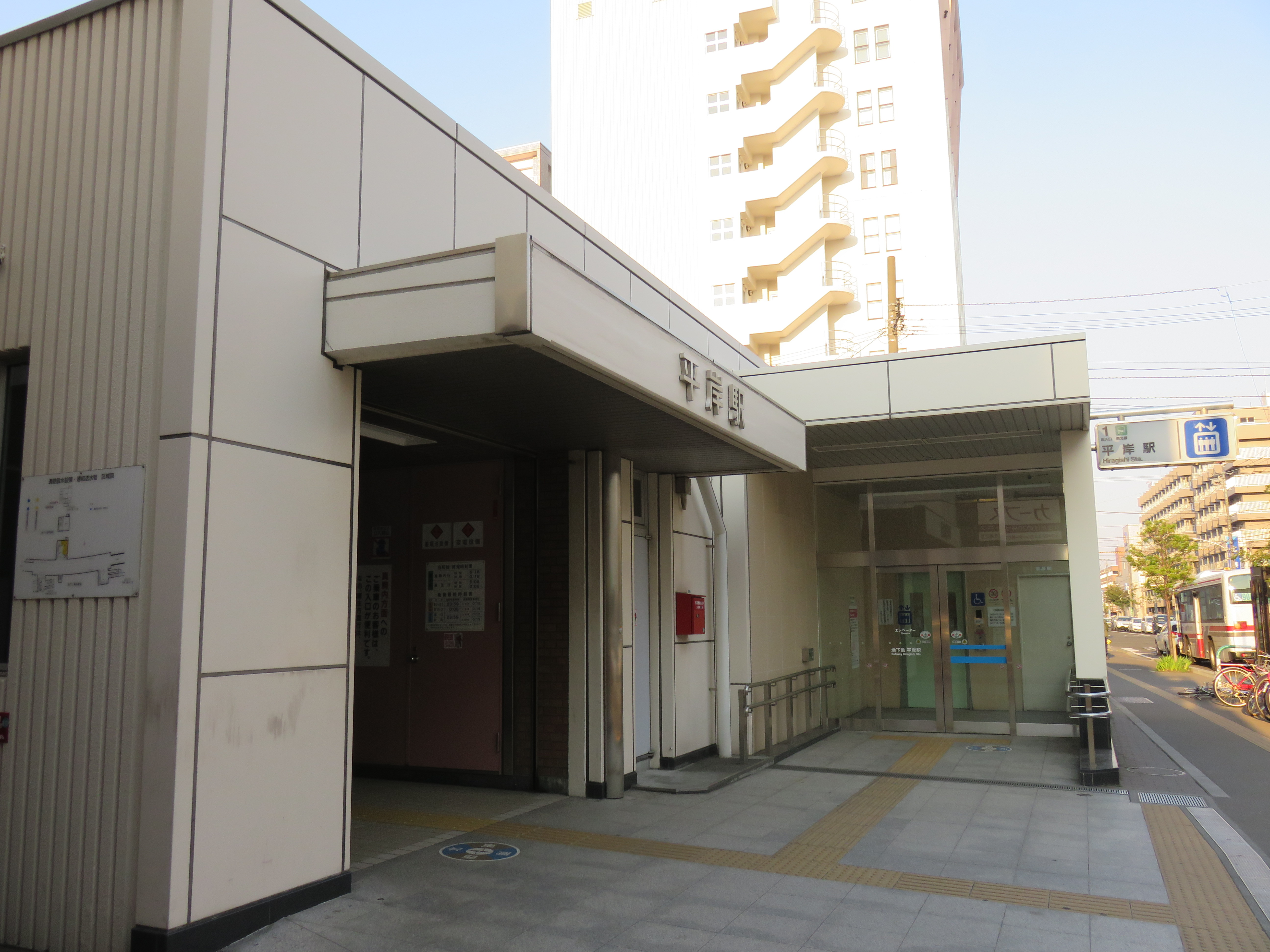 平岸駅1番出入口